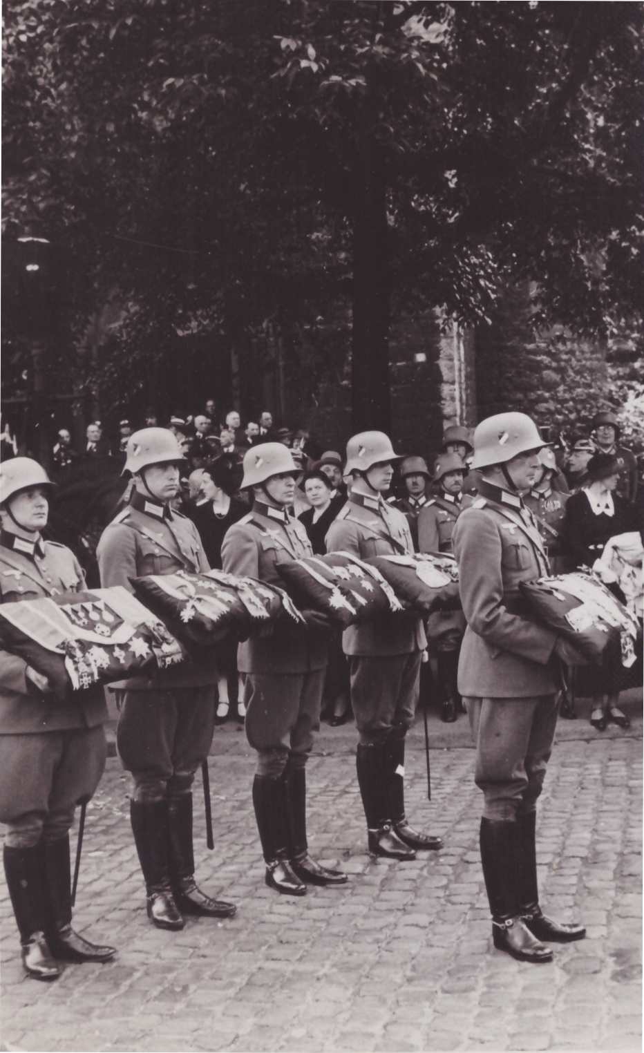 Staatsbegräbnis Alexander v. Linsingen 8. Juni 1935, Ordenskissen